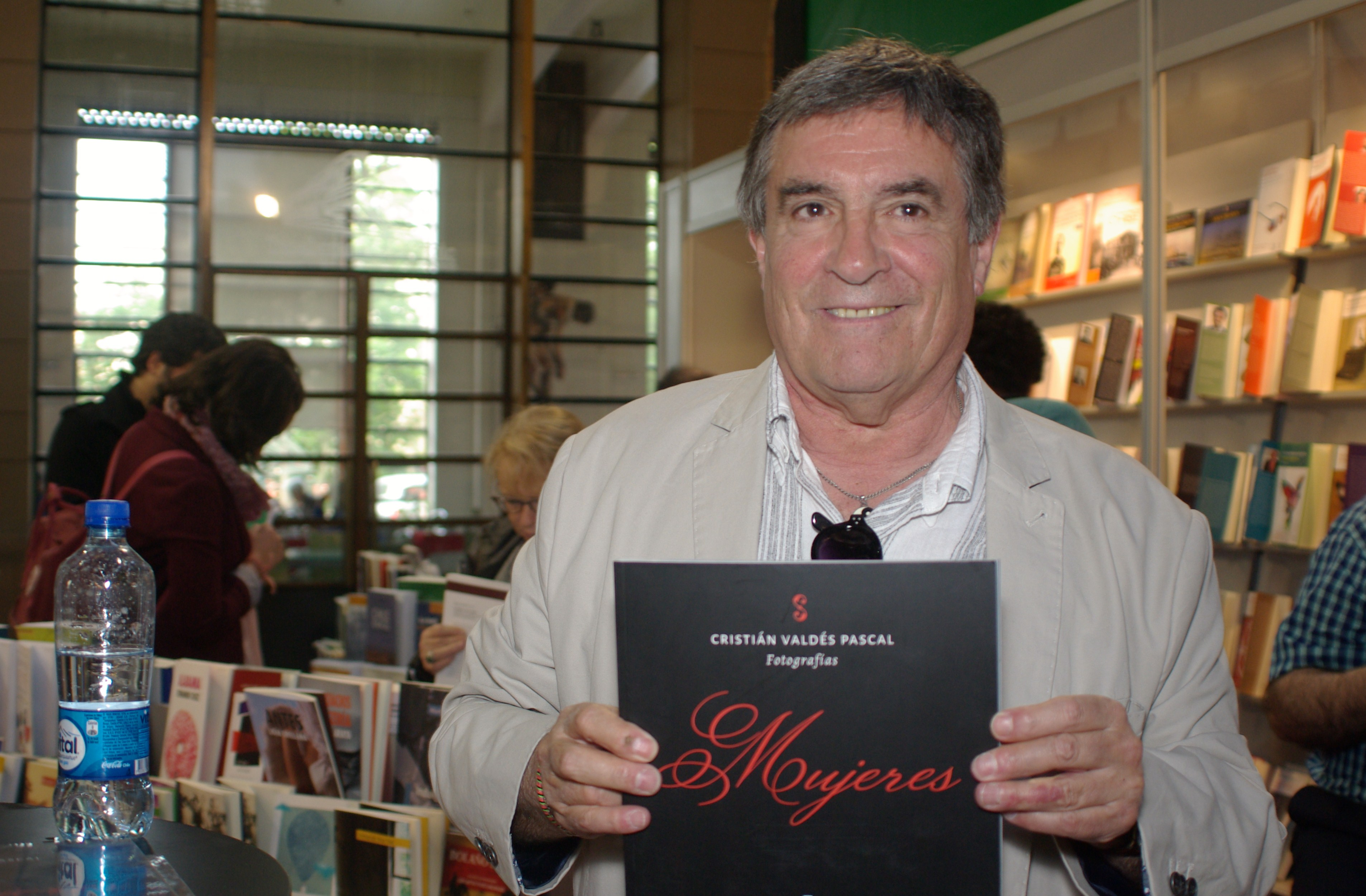 El cineasta y fotógrafo chileno Cristián Valdés en la Feria Internacional del Libro de Santiago 2015